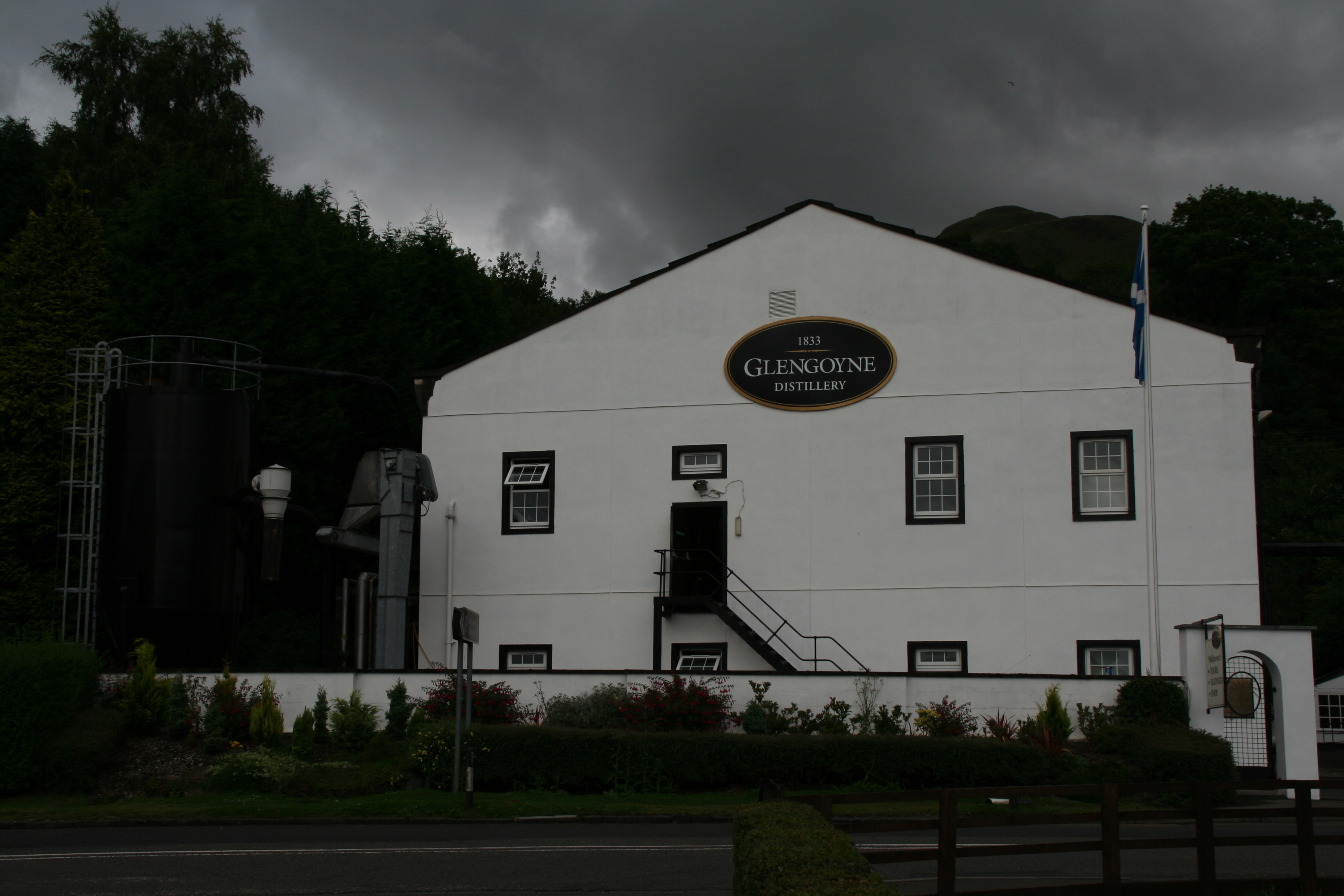 Glengoyne Distillery